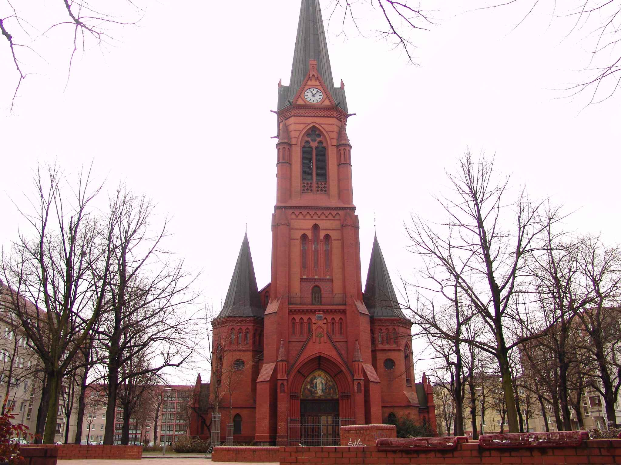 Nordseite der Lukaskirche in Leipzig-Volkmarsdorf (2005)